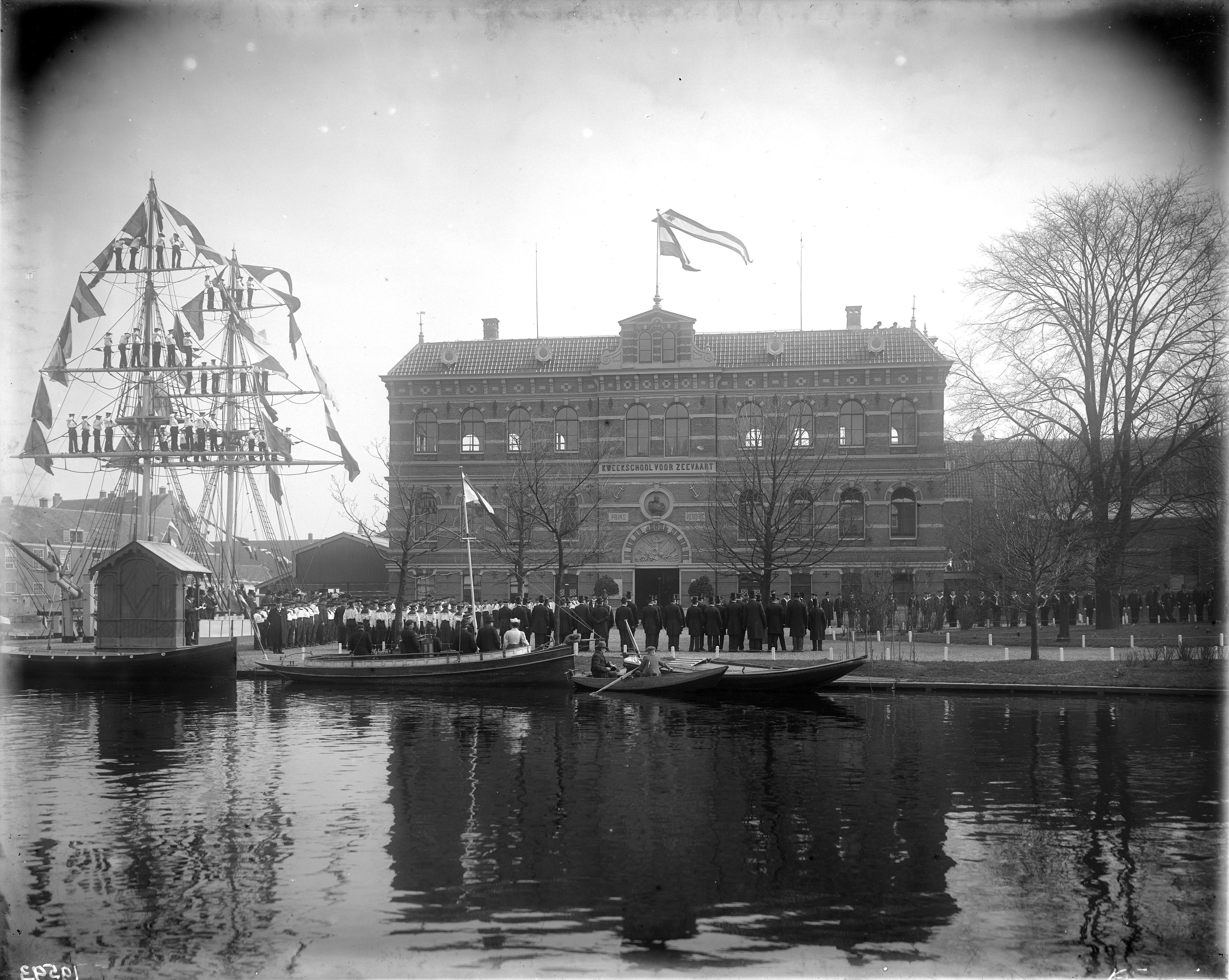 Gezicht op de voorgevel van de Zeevaartschool aan het Galgewater, met leerlingen en gezagsdragers ervoor, tijdens een officiële gebeurtenis. In de mast staan leerlingen. In de gevel zeevaartattributen en de portretbuste van Prins Hendrik de Zeevaarder. Tekst: Kweekschool voor Zeevaart / Prins Hendrik.